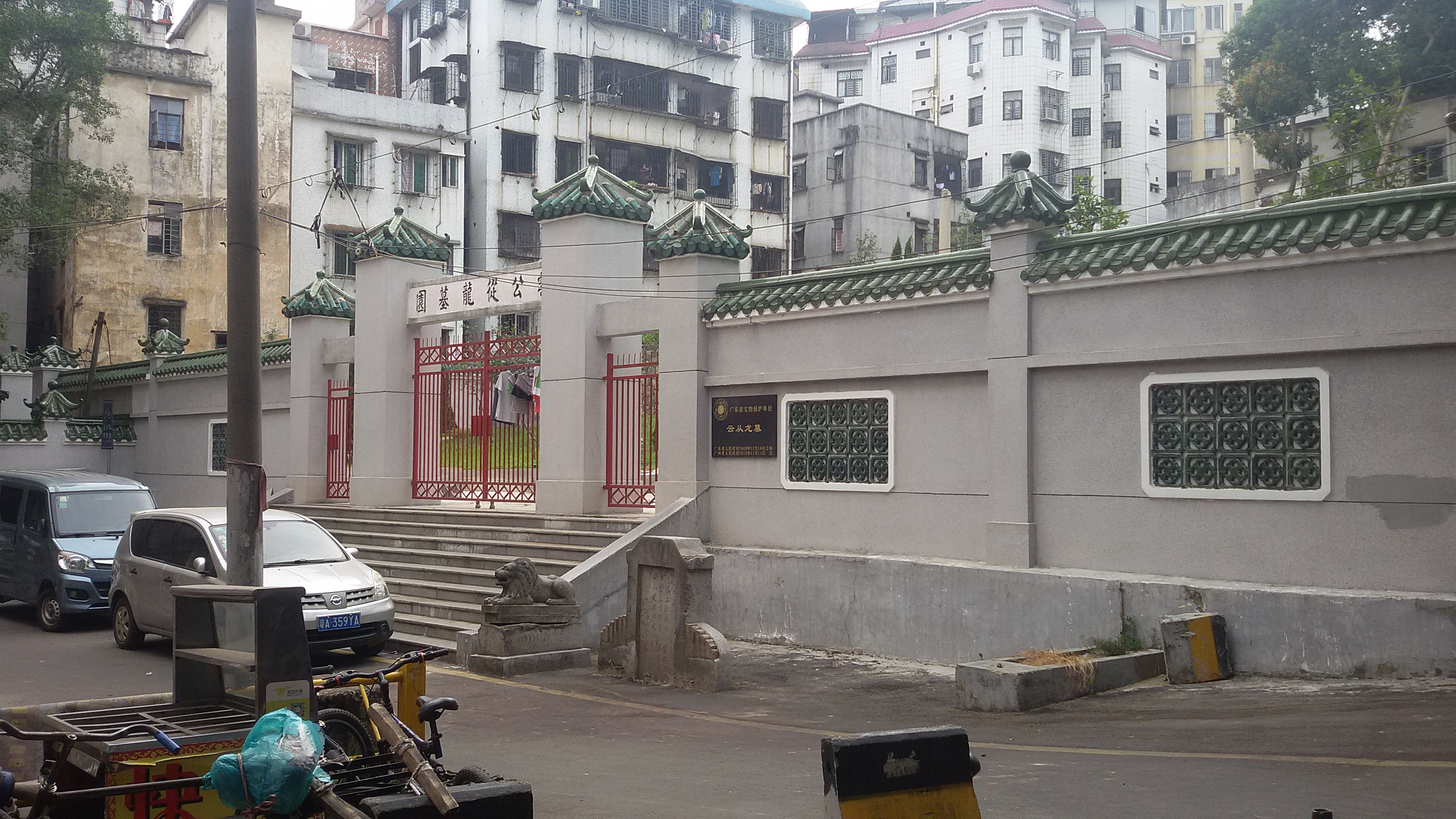 粵語: 雲從龍墓